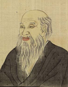 海量肖像『近世名家肖像』より